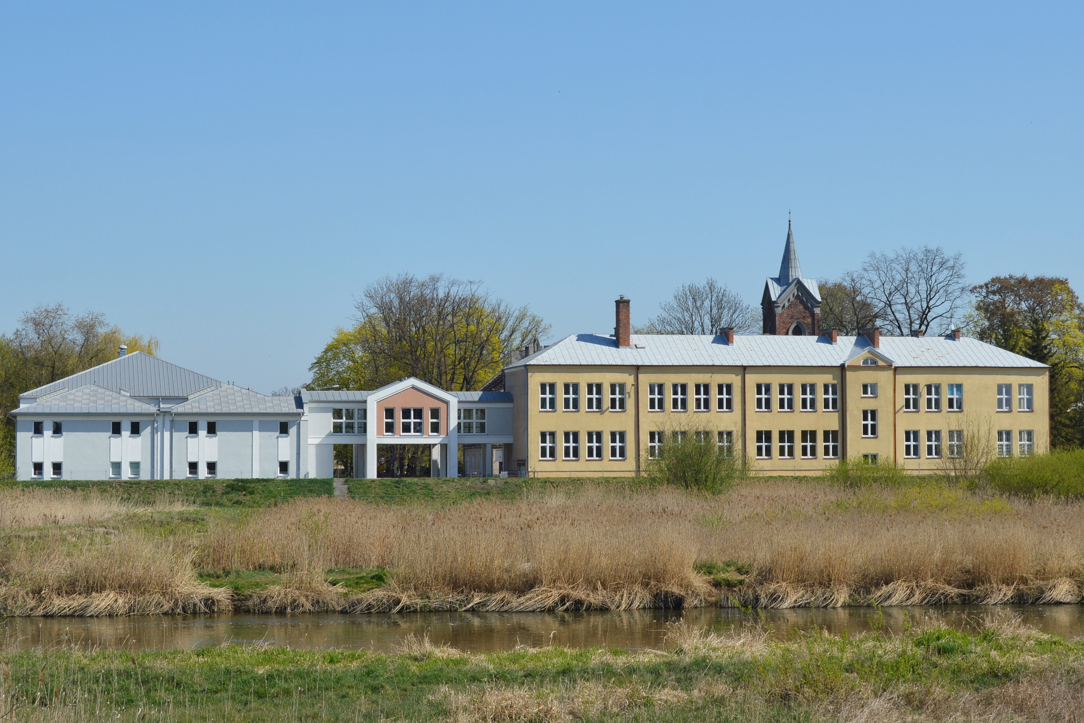 Budynek Zespołu Szkół Ekonomiczno-Administracyjnych w Kole - widok ze Starego Miasta